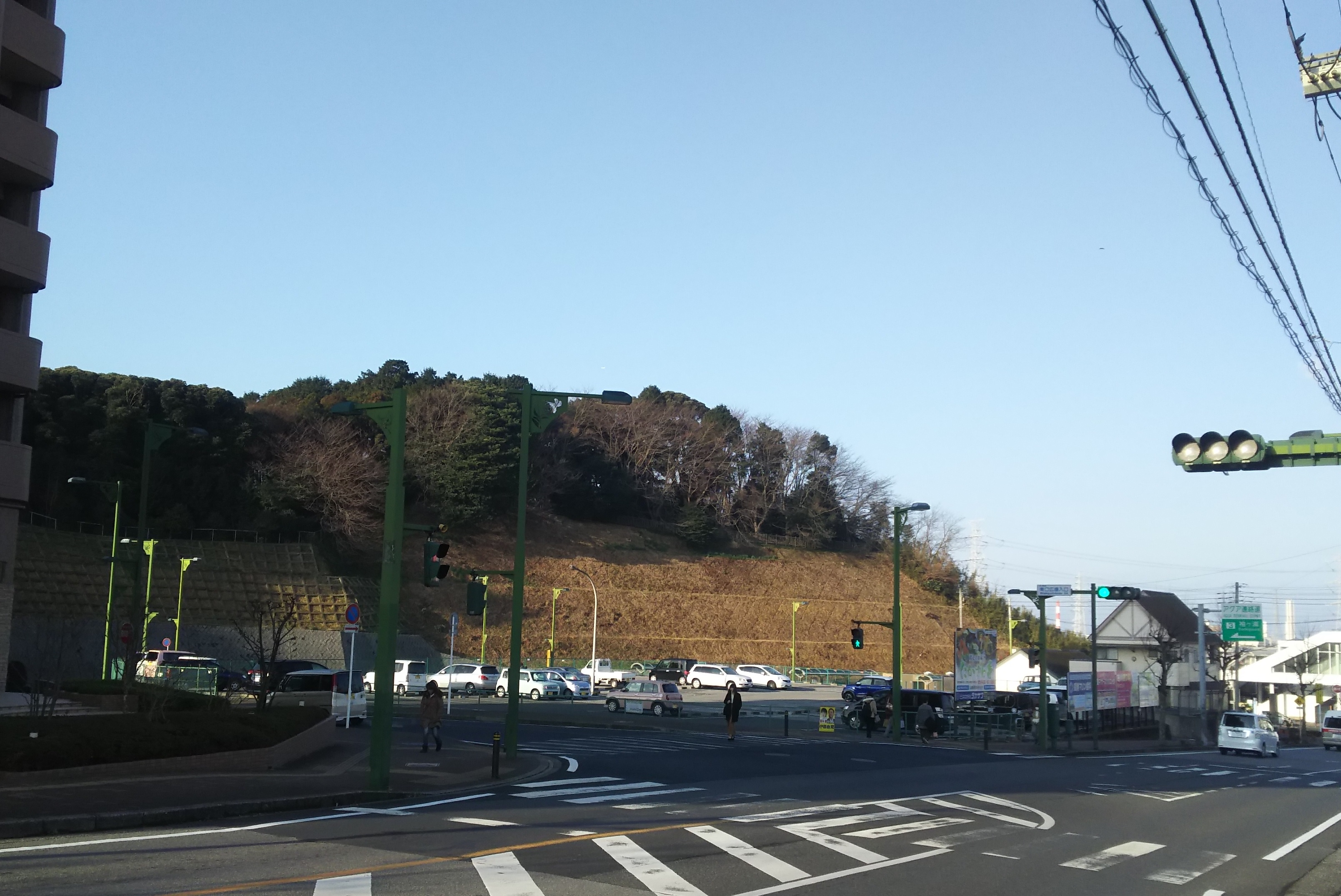 蔵波城 遠景